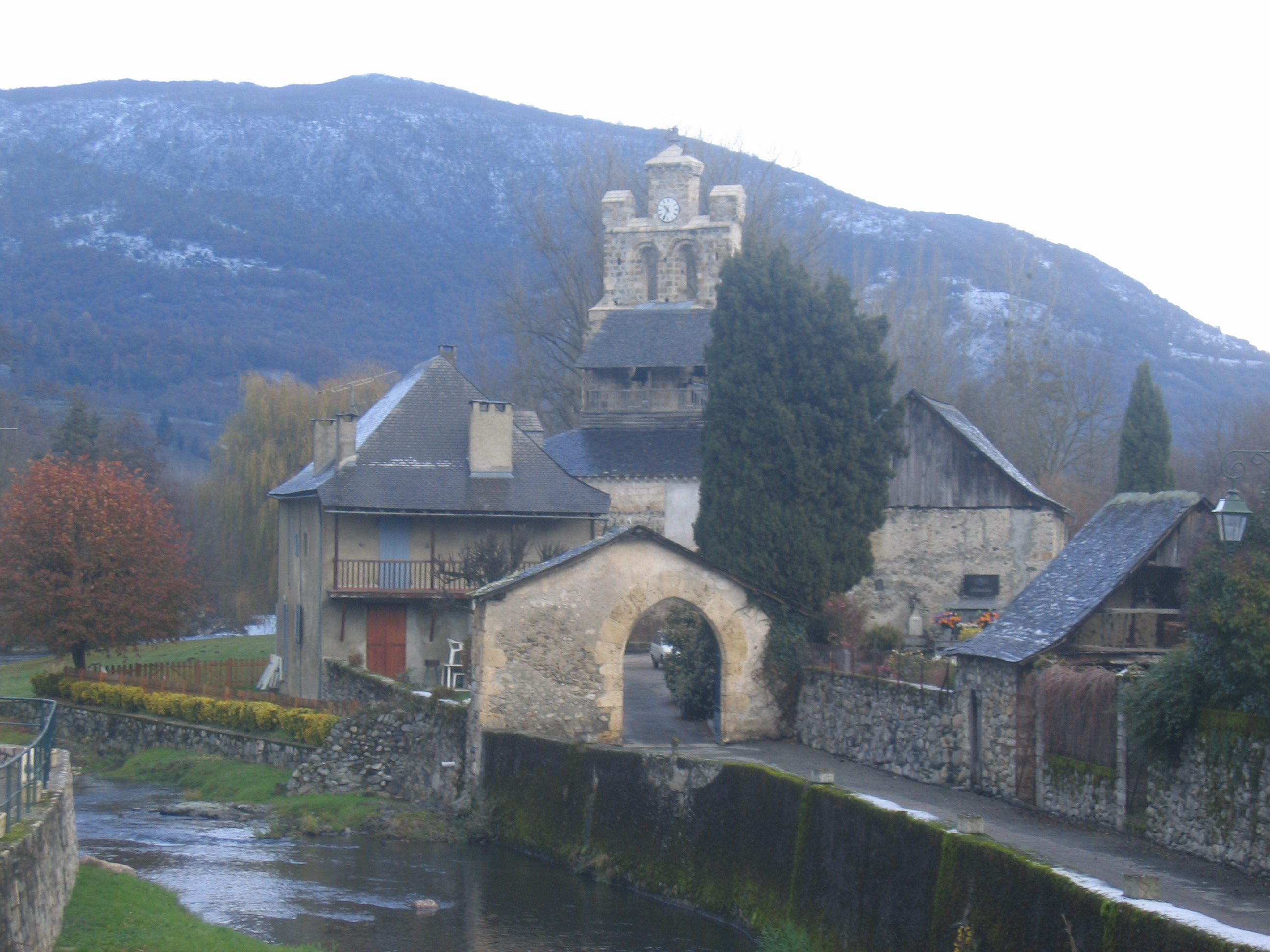 Village d'Audressein dans l'Ariège.